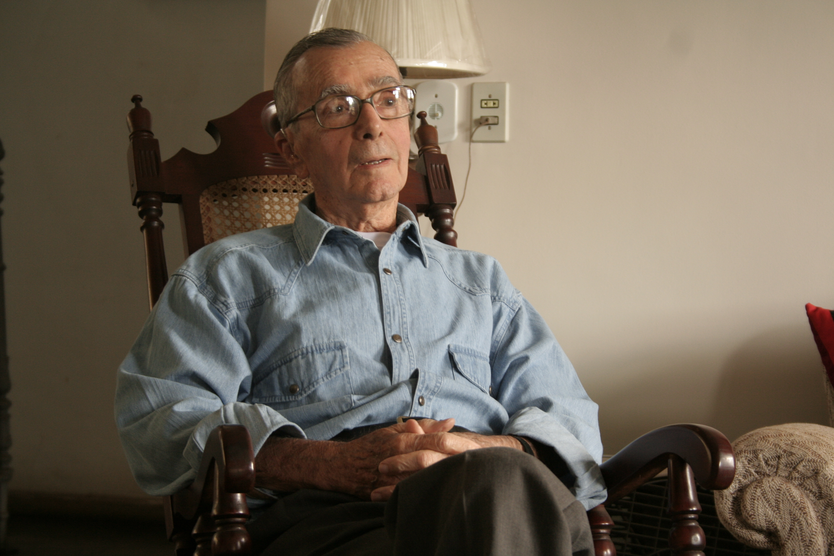 Foto do escritor Herminio C. Miranda